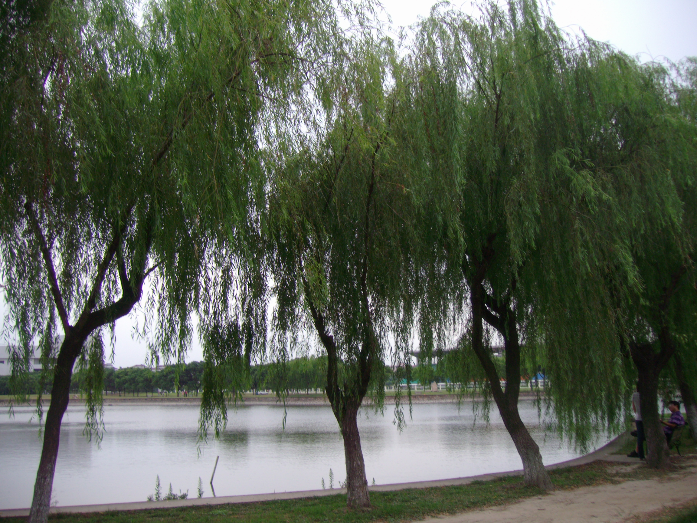 上海交大闵行校区